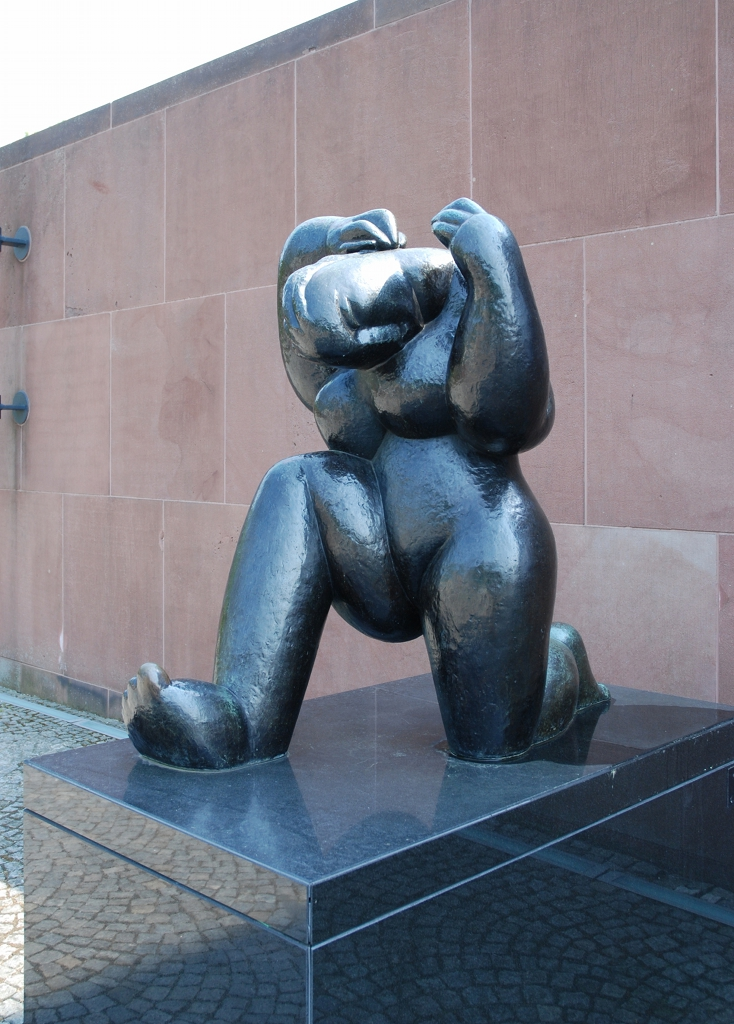 Le matin (Der Morgen) [1944] von Henri Laurens. Bronze, ca. 117 cm hoch. Standort: Kunsthalle Bielefeld, aufgestellt: 1970